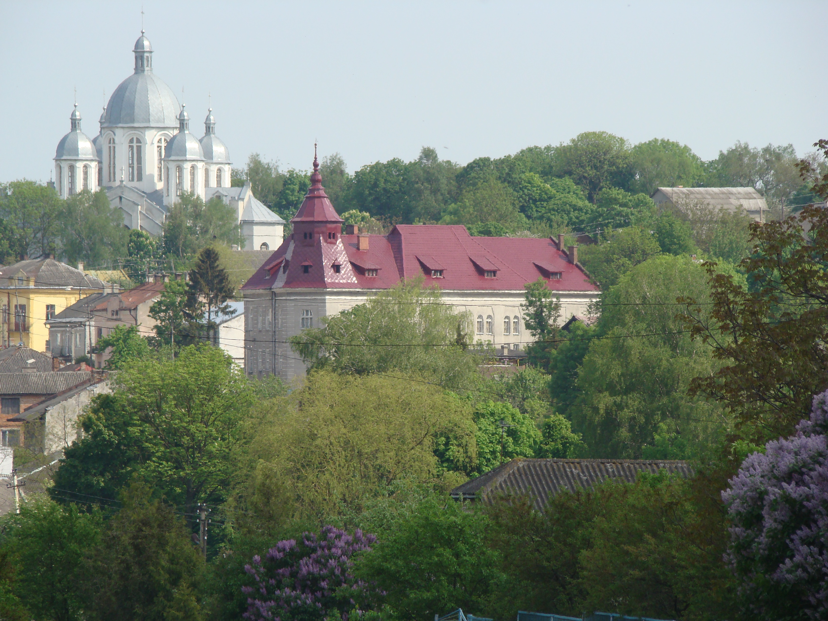 Widok na cerkiew greckokatolicką i ukraiński Dom Ludowy (z wiśniowym dachem) Podhajce 2008